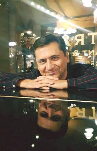 Сомборски сусрет